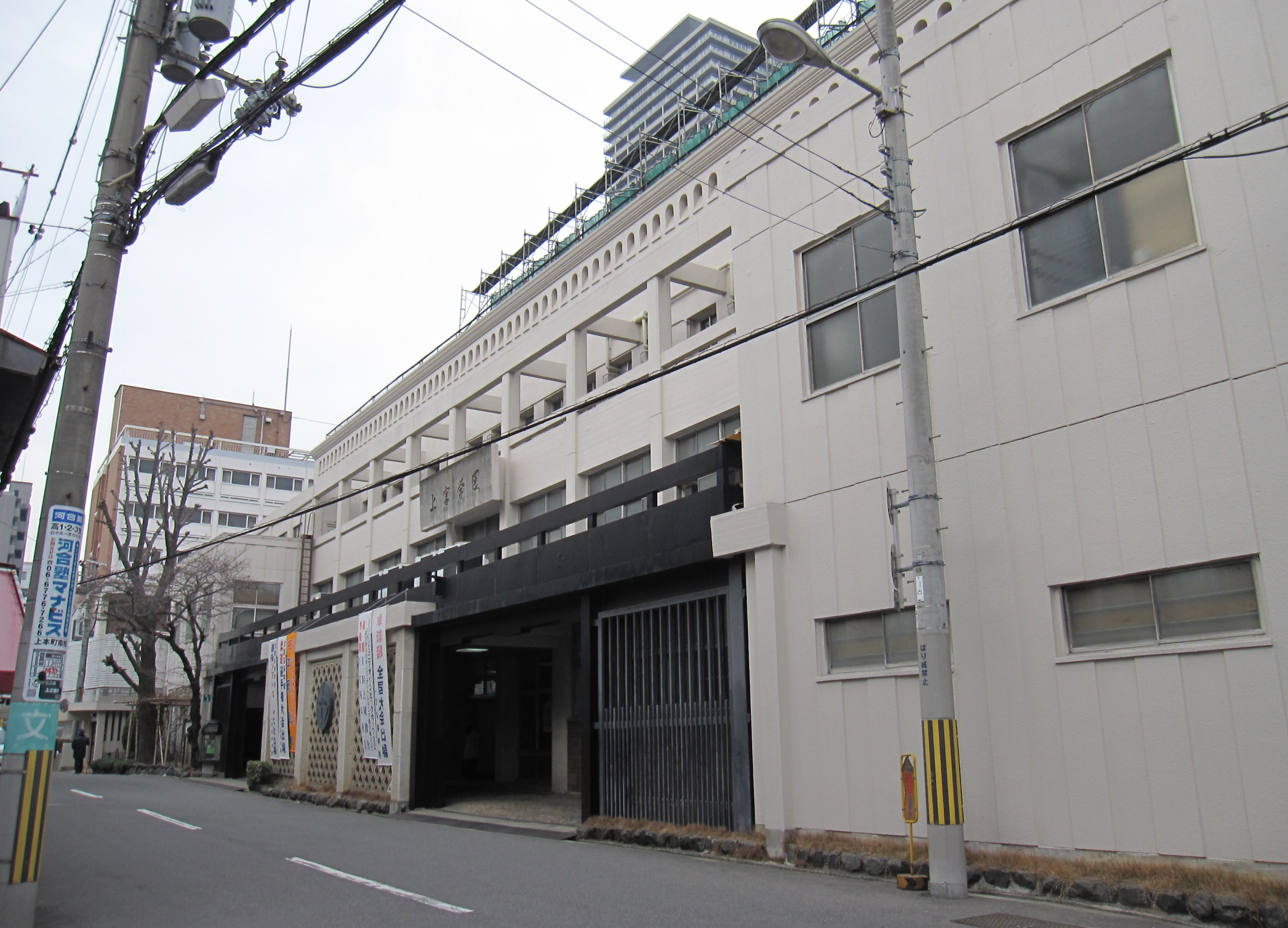 上宮中学校・高等学校 Canon IXY Digital 920 IS